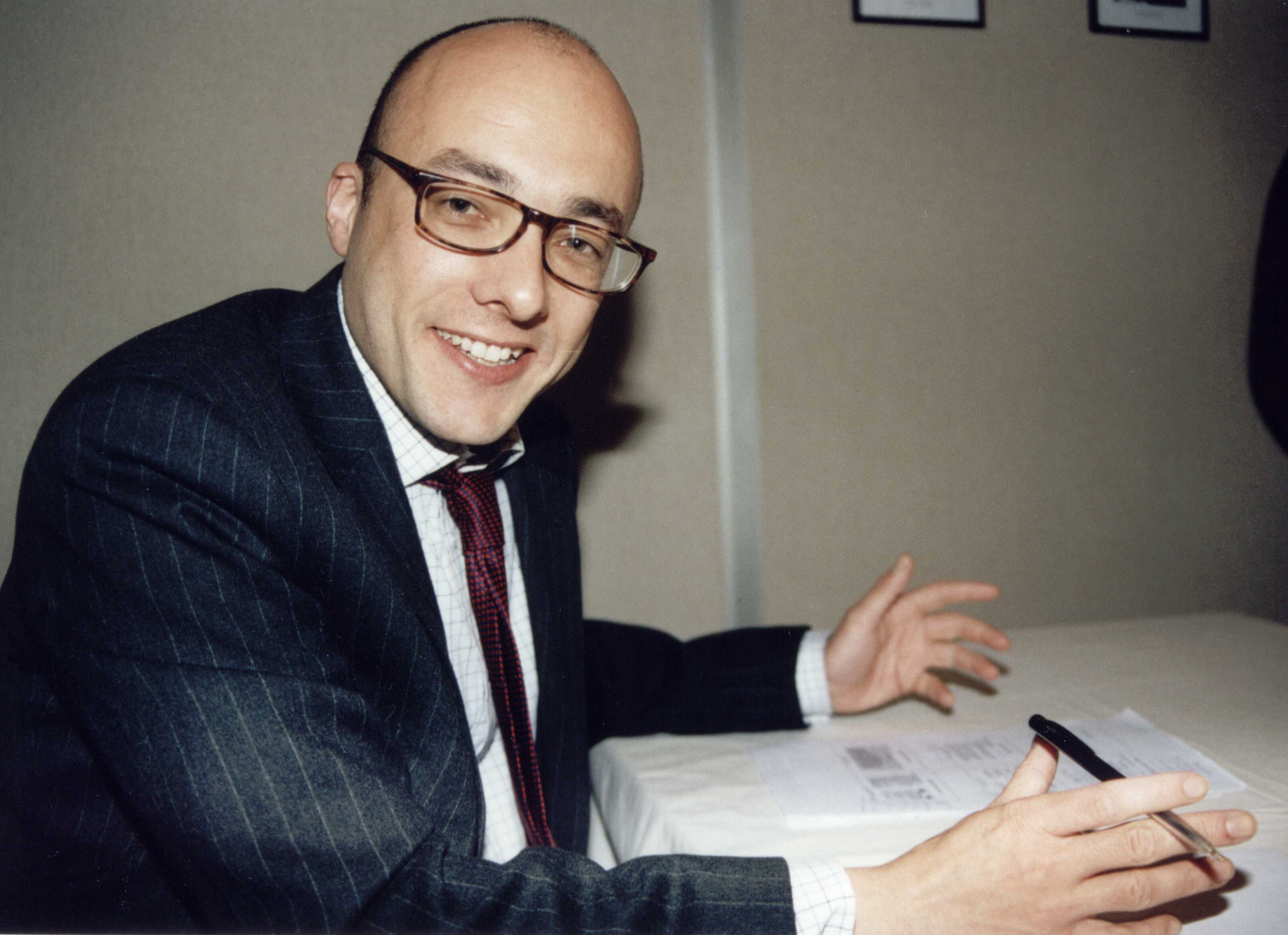 Daffyd ap Fergus, Malferma Tago de UEA.